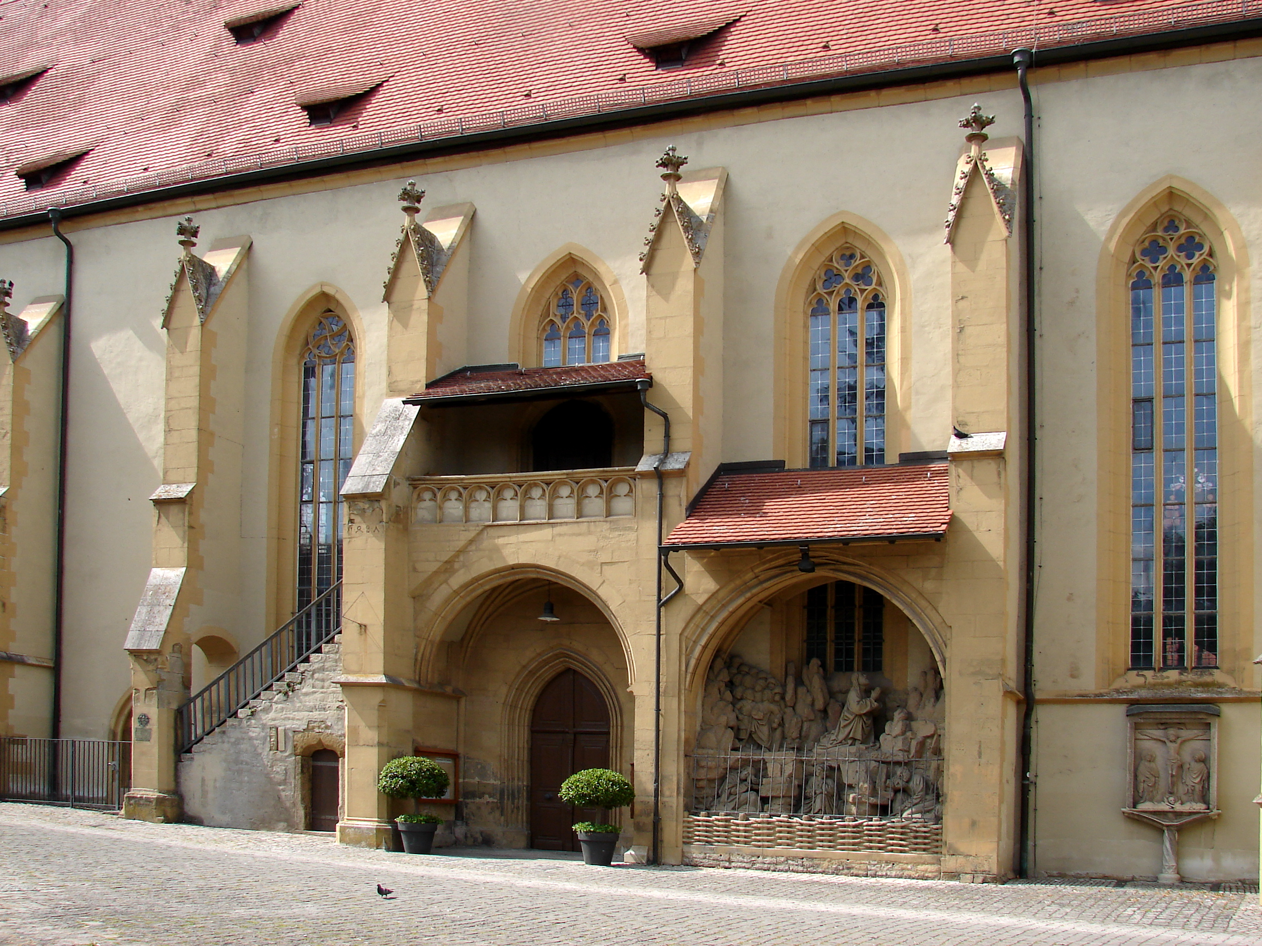 Spätgotische Hallenkirche mit eingezogenem Chor, um 1402 bis um 1460, Kirchenweihe 1487, Turmaufbau 1737, Chorverglasung 1959/60 von Johannes Schreiter; mit Ausstattung